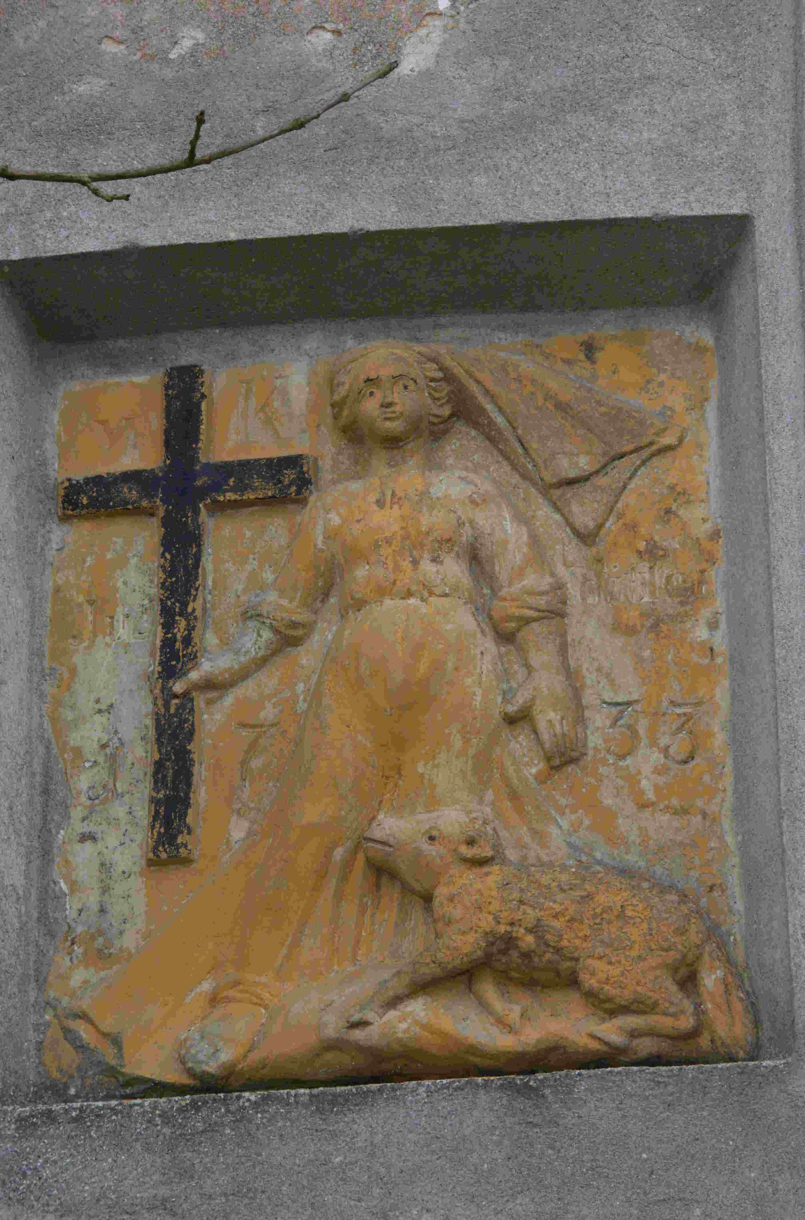 Juditten - Tafel 1733